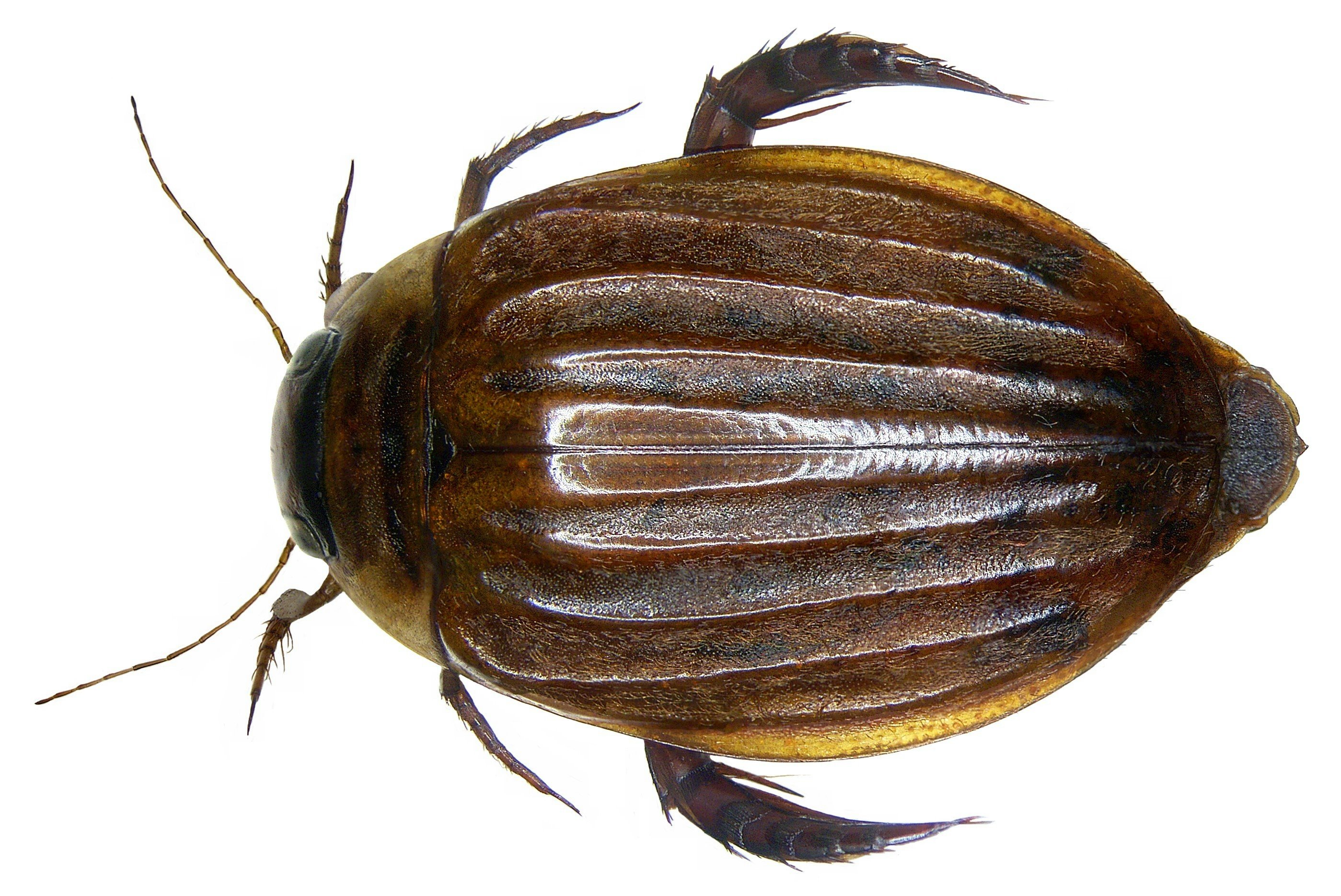 Acilius sinensis Peschet, 1915, female. Familie: Dytiscidae Grösse: 15 mm Fundort: China, Süd-Yunnan, Dehong Dai leg. D.Wase, 2007; det. L.Hendrich Foto: U.Schmidt, 2008